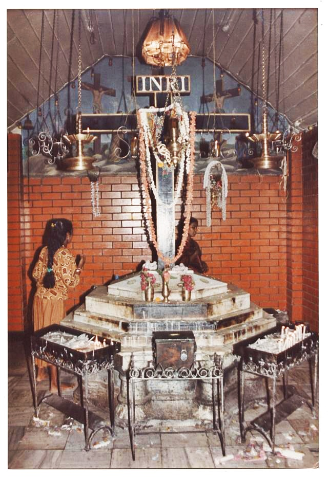 Coonan Cross, Holy Cross Chappel, Cochin, Matancherry, Kerala, India